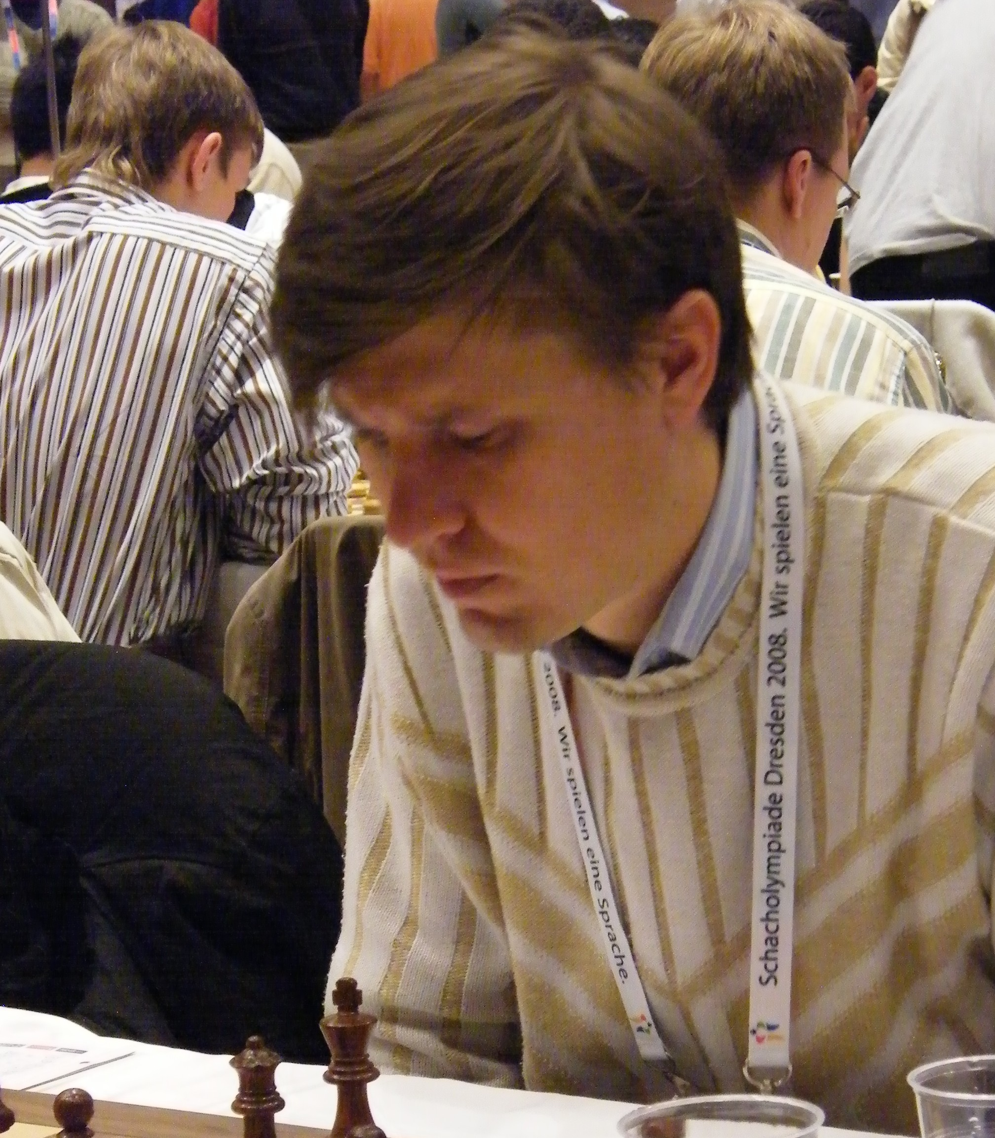 GM Pawel Kozur (Pavel Kotsur) bei der Schacholympiade 2008 in Dresden